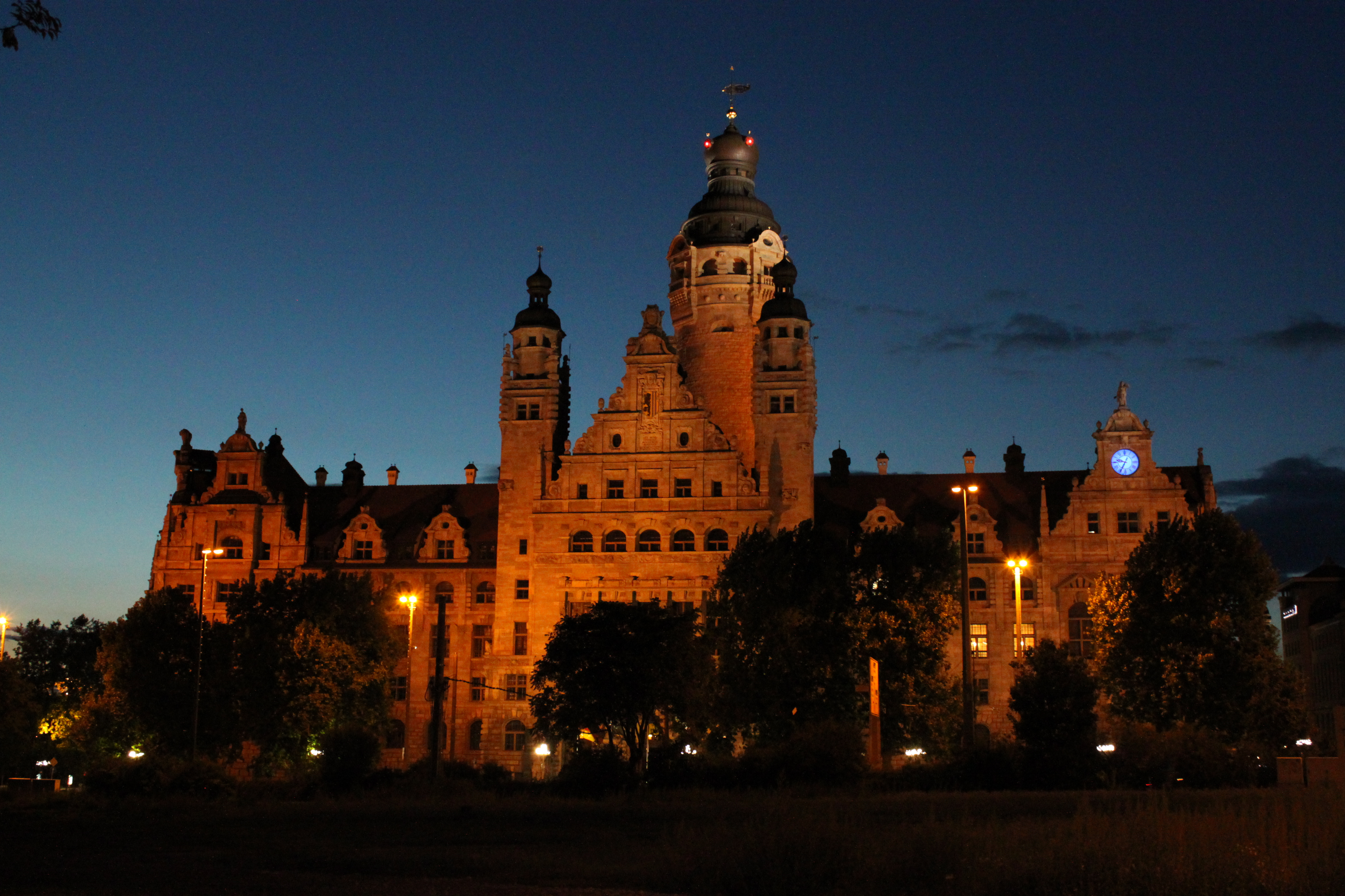 Neues Rathaus in Leipzig bei Nacht